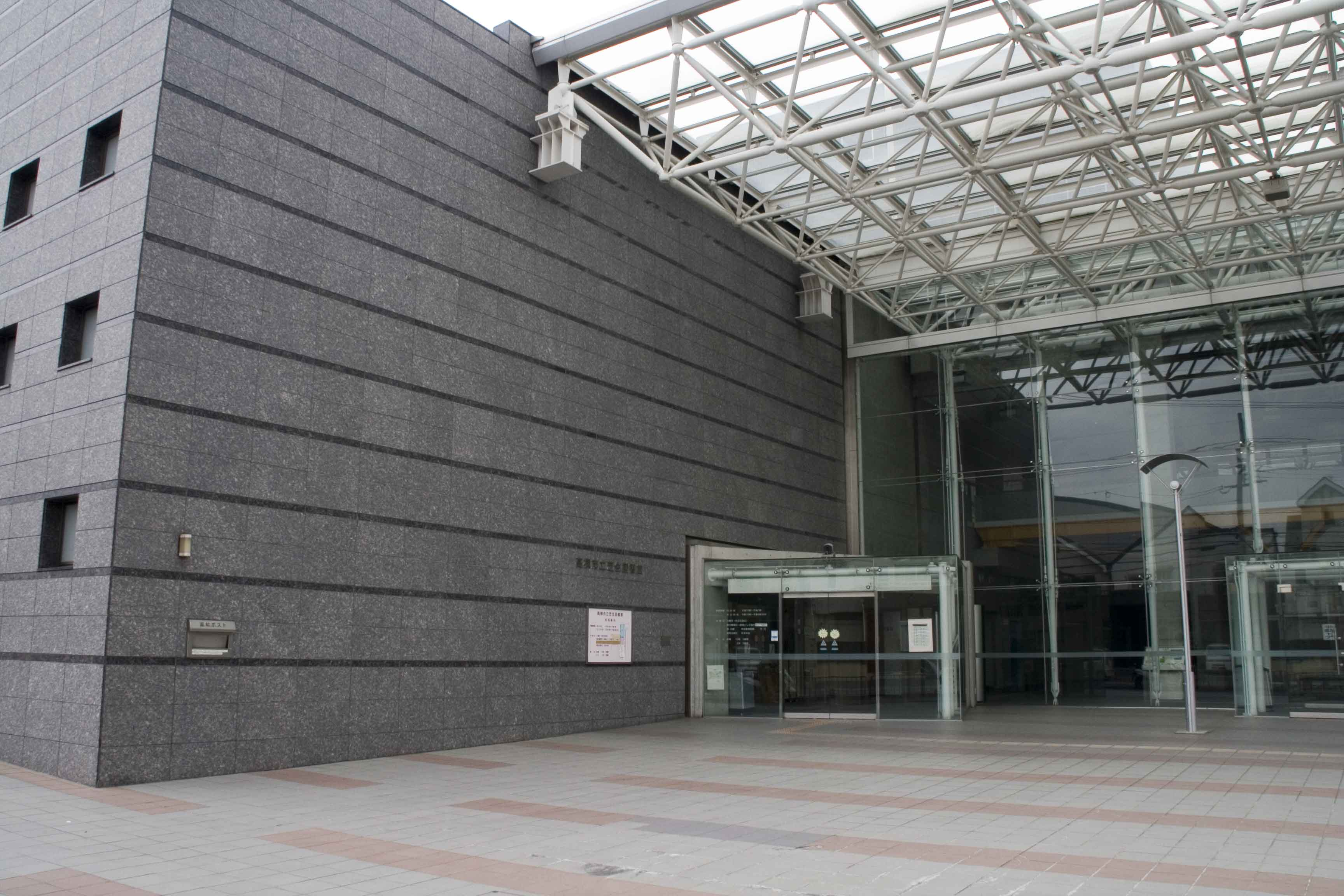 高槻市立芝生図書館